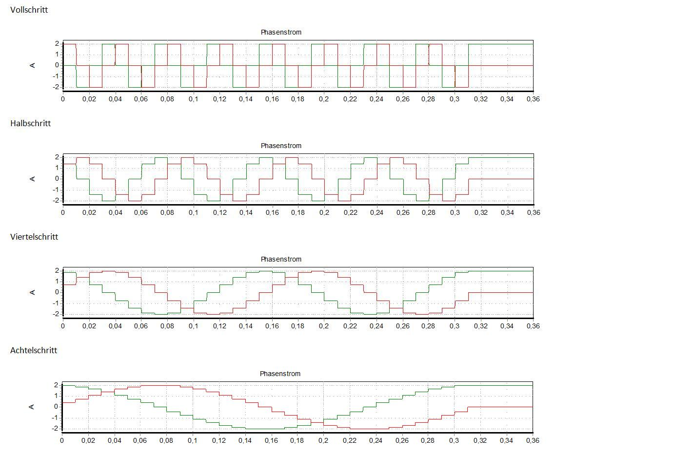 Elektronische Ansteuerung eines Schrittmotors zur Schrittteilung.